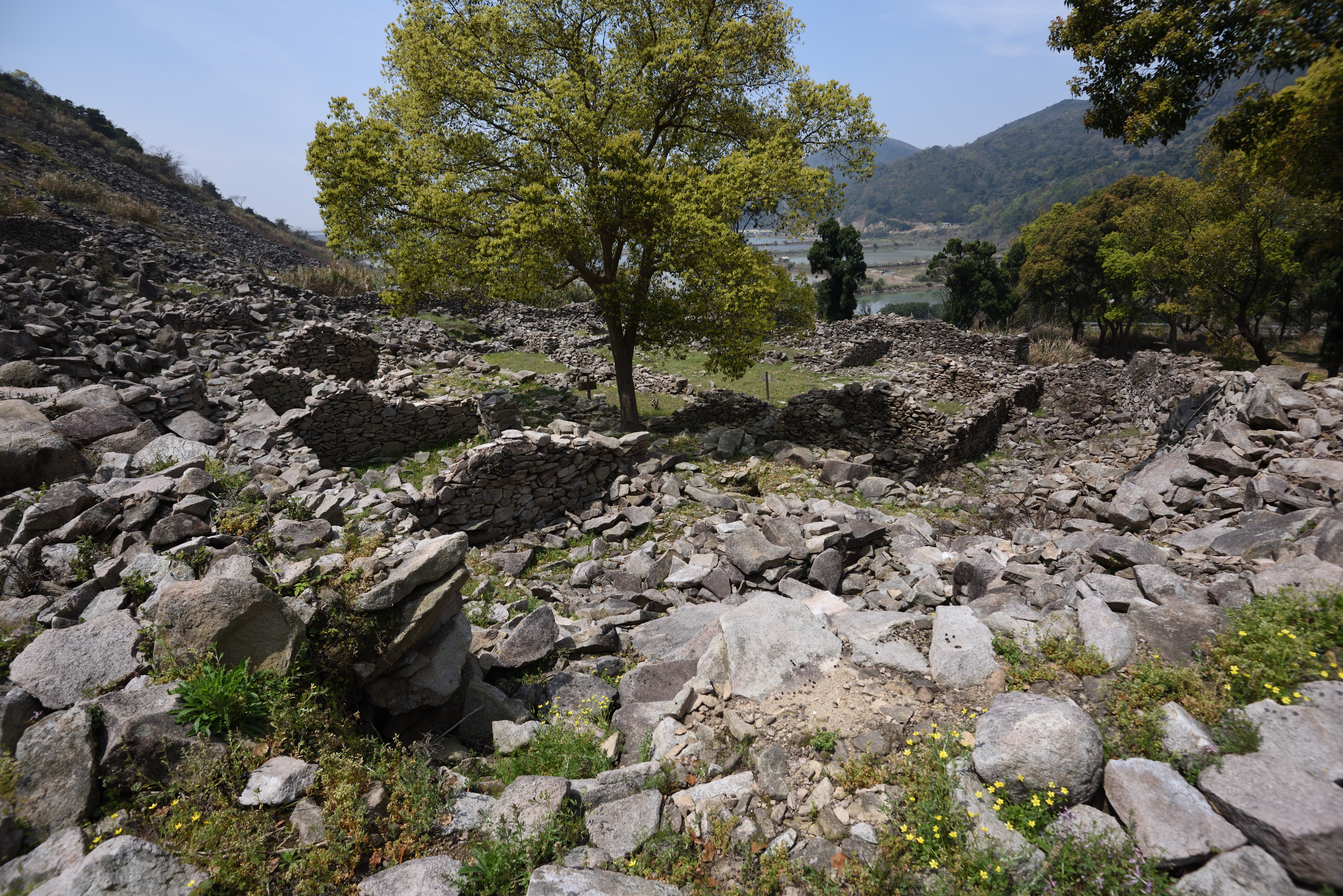 花岙兵营遗址——高涂岙兵营